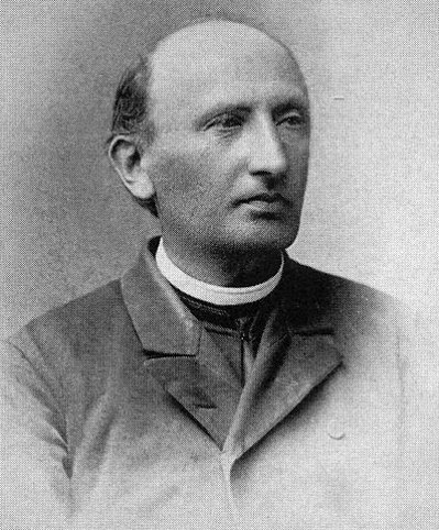 Данило Танячкевич